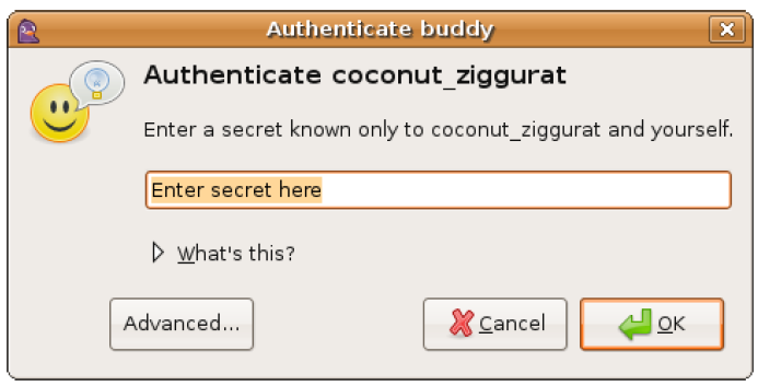 חלון שיתוף סוד של תוכנת פידג'ין